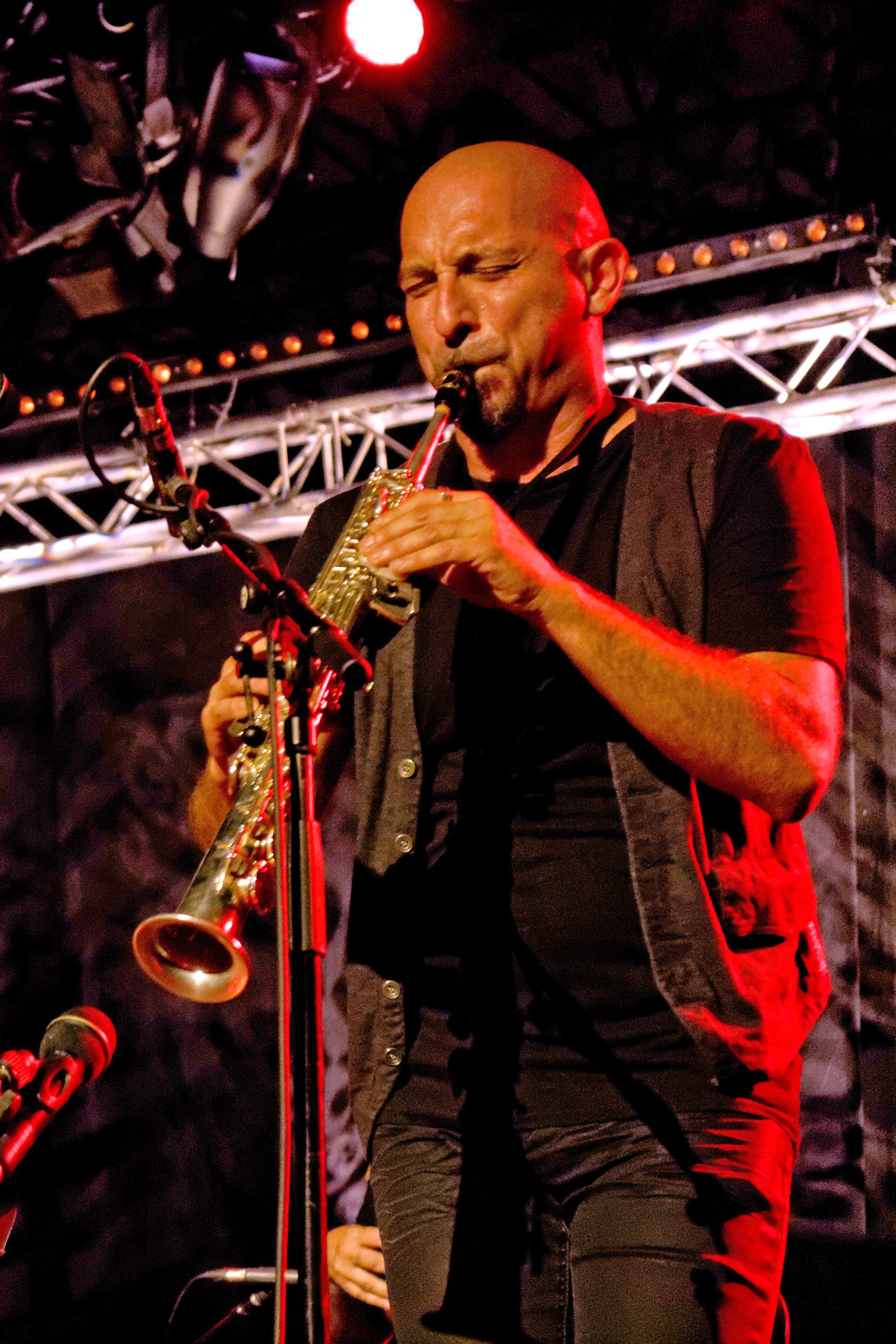 Denez Prigent en concert sur la scène Gradlon lors du festival de Cornouaille 2014.